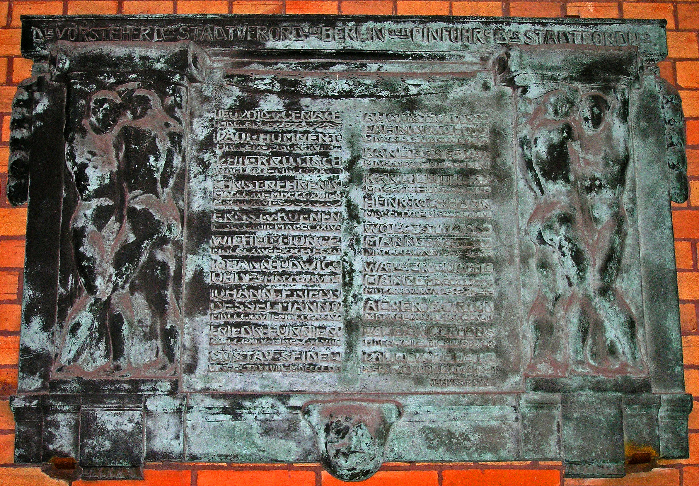 Gedenktafel für die Berliner Stadtverordnetenvorsteher 1809-1908 im Roten Rathaus Berlin. Die kaum noch leserliche Inschrift lautet: DIE VORSTEHER DER STADTVERORDNETEN IN BERLIN SEIT EINFÜHRUNG DER STÄDTEORDNUNG LEOPOLD•VON•GERLACH 1809 PAUL•HUMBERT 1809 bis 1818 PHILIPP•KRUTISCH 1819 bis 1820 CHRISTIAN•BEHRENDT 1821 bis 1822, 1826 ERNST•VON•KOENEN 1823 bis 1824 WILHELM•JUNGE 1825 JOHANN•LUDWIG•UHDE 1827 JOHANN•FRIEDRICH•DASSELMANN 1828 bis 1844 FRIEDRICH•FOURNIER 1845 bis 1848 GUSTAV•SEIDEL 1848 bis 1850 AUGUST•OTTO•FÄHNDRICH 1850 bis 1857 KARL•ESSE 1858 bis 1860 KARL•LÜTTIG 1860 bis 1862 HEINRICH•KOCHHANN 1863 bis 1874 WOLFGANG•STRASSMANN 1875 bis 1885 WALTHER•BÜCHTEMANN 1885 bis 1886 ALBERT•STRYCK 1886 bis 1893 PAUL•LANGERHANS 1893 bis 1908 PAUL•MICHELET seit 1908 JANUAR 1908